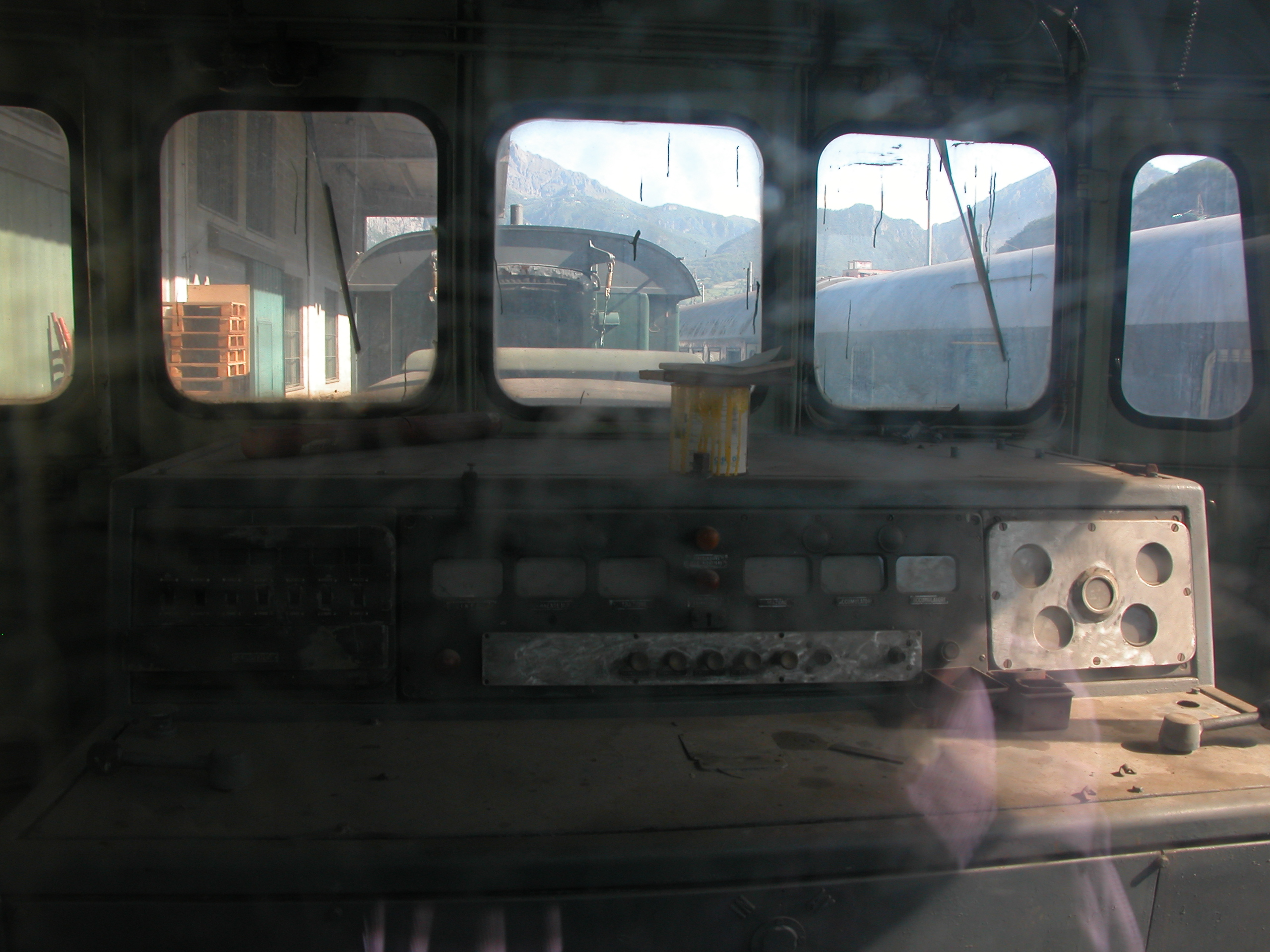 Locomotiva elettrica da manovra FS E.321.003 – Banco di manovra visto attraverso i vetri dal praticabile posteriore.